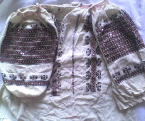 Румънска традиционна женска риза, оригинална бродерия. Licensing автор: Георги Петров